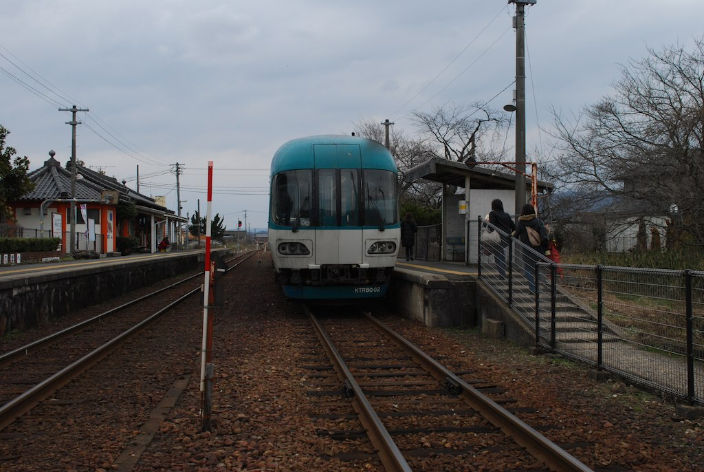 タンゴ・ディスカバリー